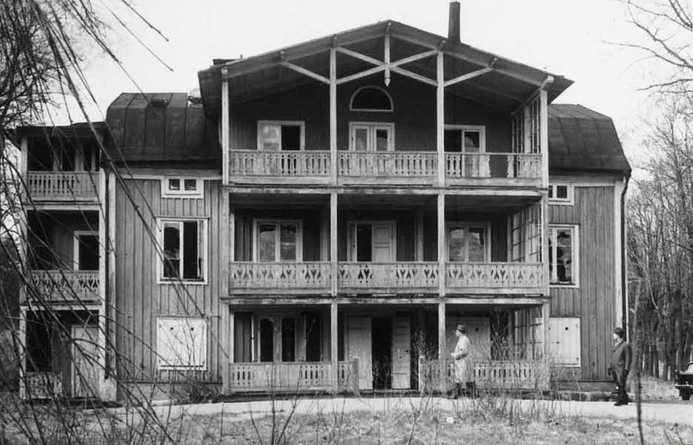 Smedslättens gård före renoveringen på 1960-talet